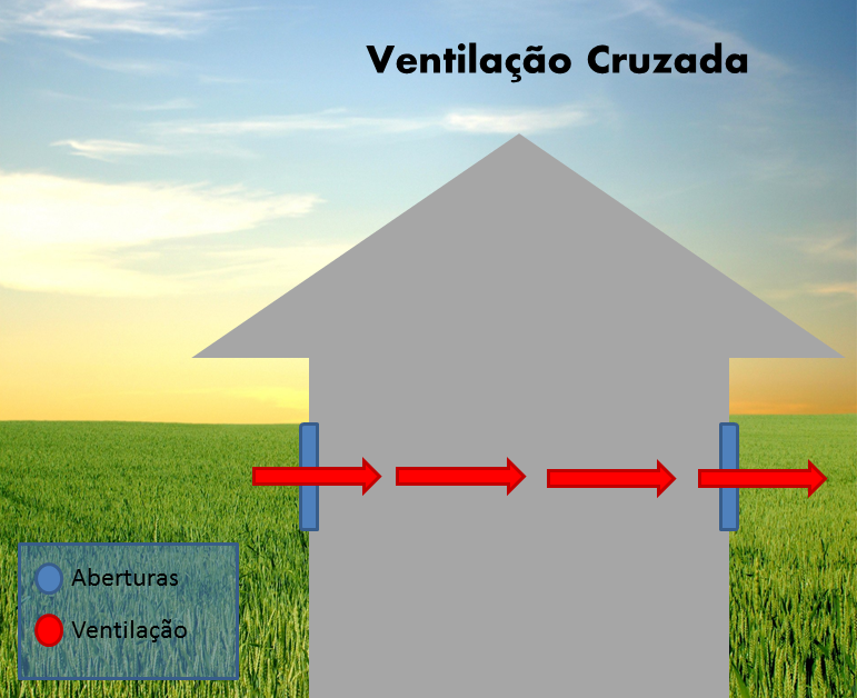 Ventilation Ventilazione